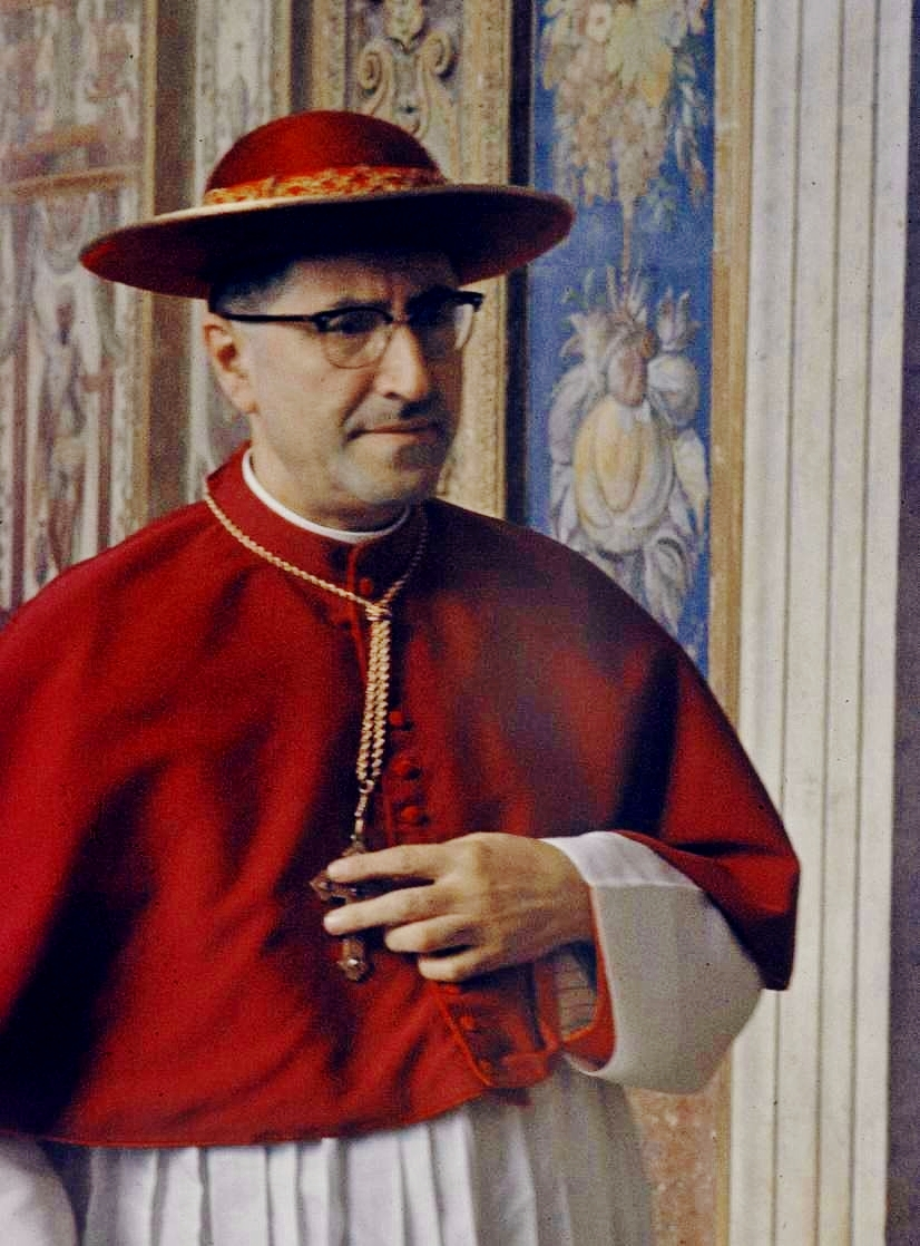 Il cardinale Giuseppe Siri